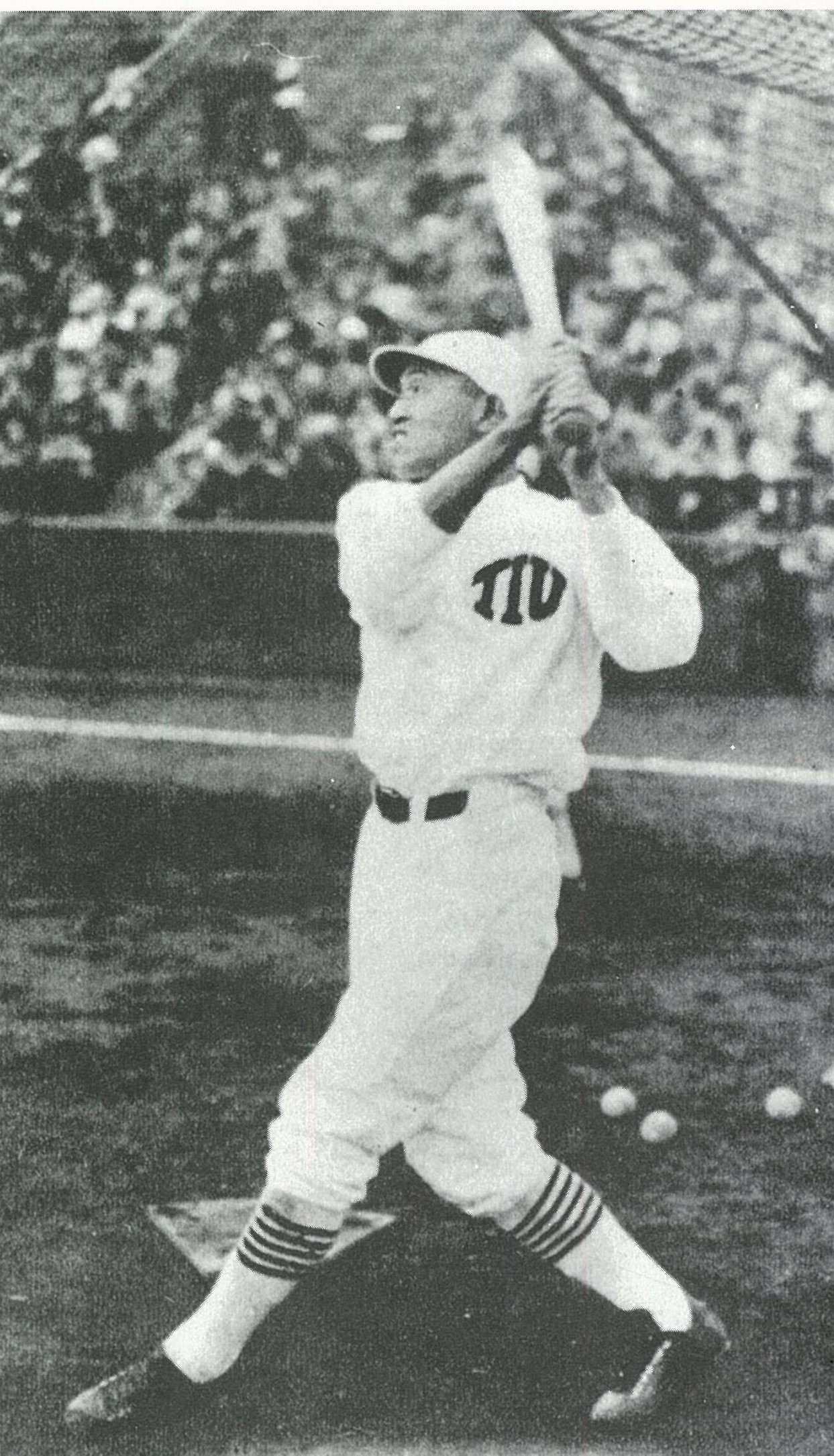 梶原英夫（東大野球部）